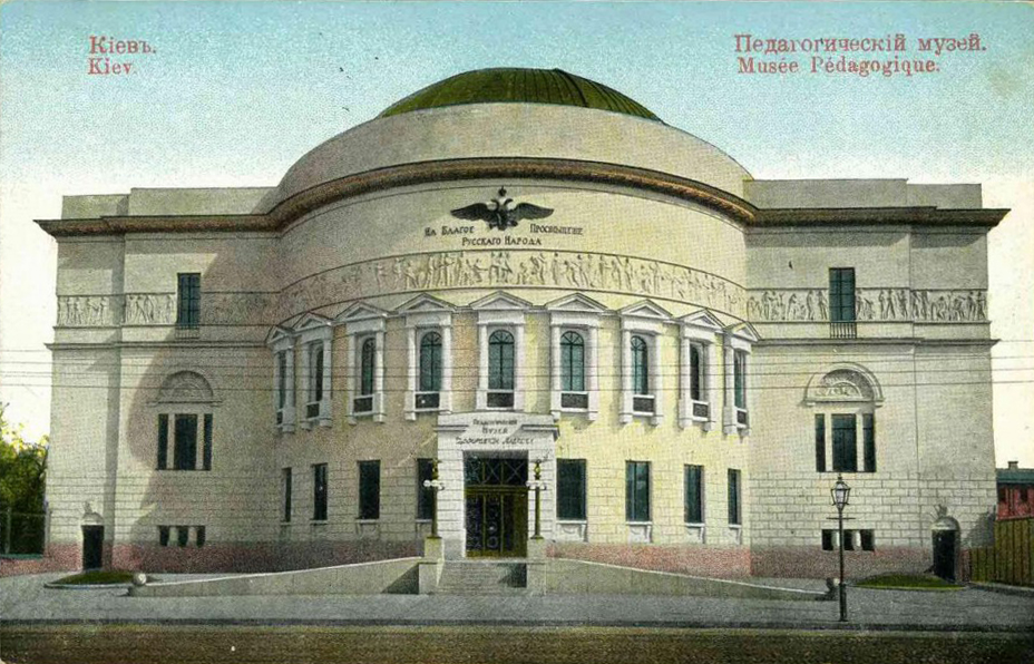 Педагогический музей в Киеве